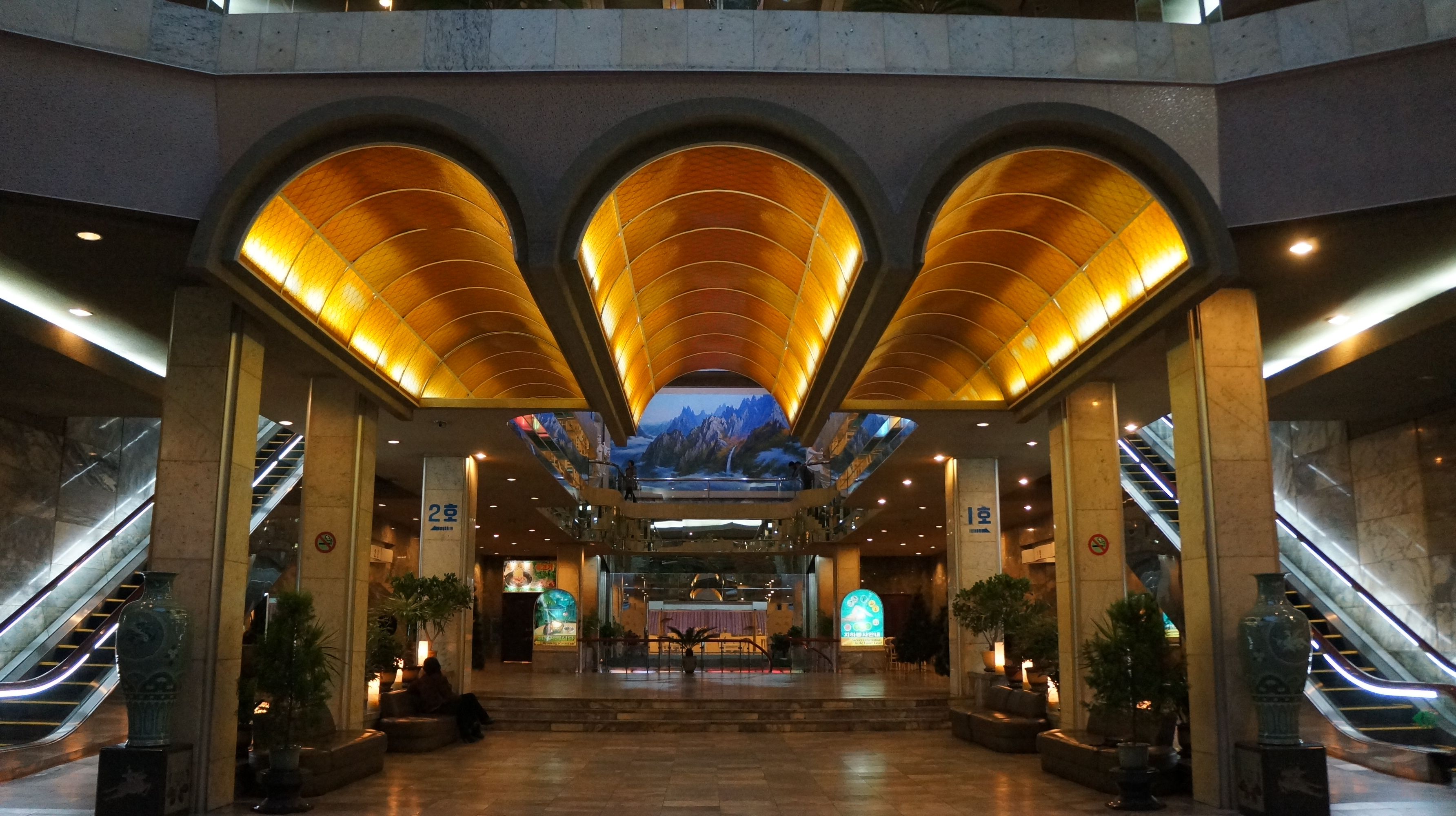 Pyongyang, North Korea DPRK